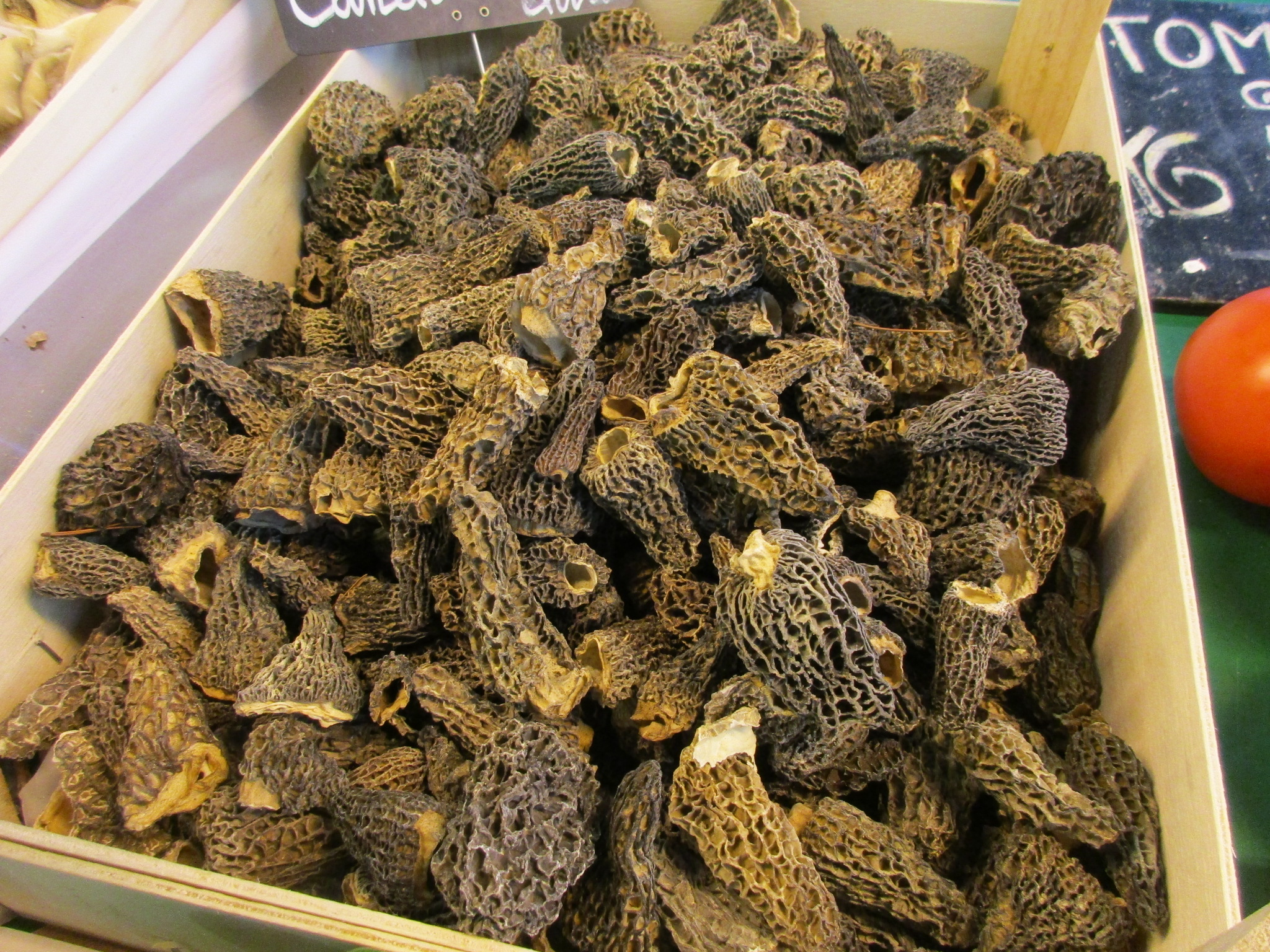 Morilles séchées